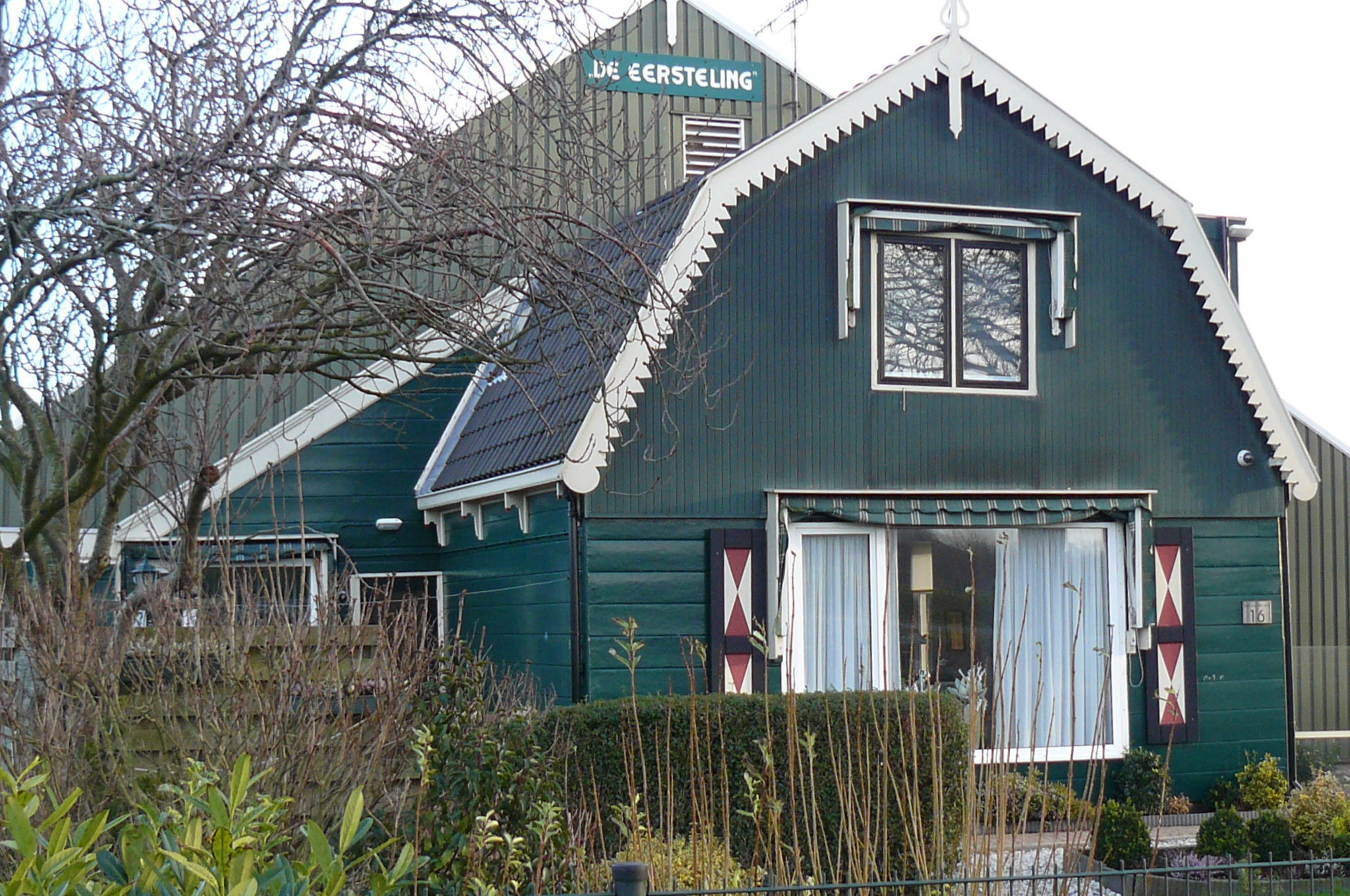 Kringwetboerderij De Eersteling. De boerderij ligt op korte afstand voor het Fort Zuidwijkermeer en is gemaakt van hout. In geval van oorlog kon het snel worden gesloopt, of afgebrand, om een vrij schootsveld te maken voor de kanonnen op het fort.